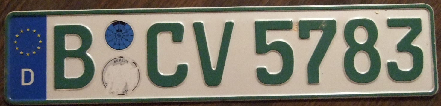 Berlin GERMANY EEC agricultural vehicle